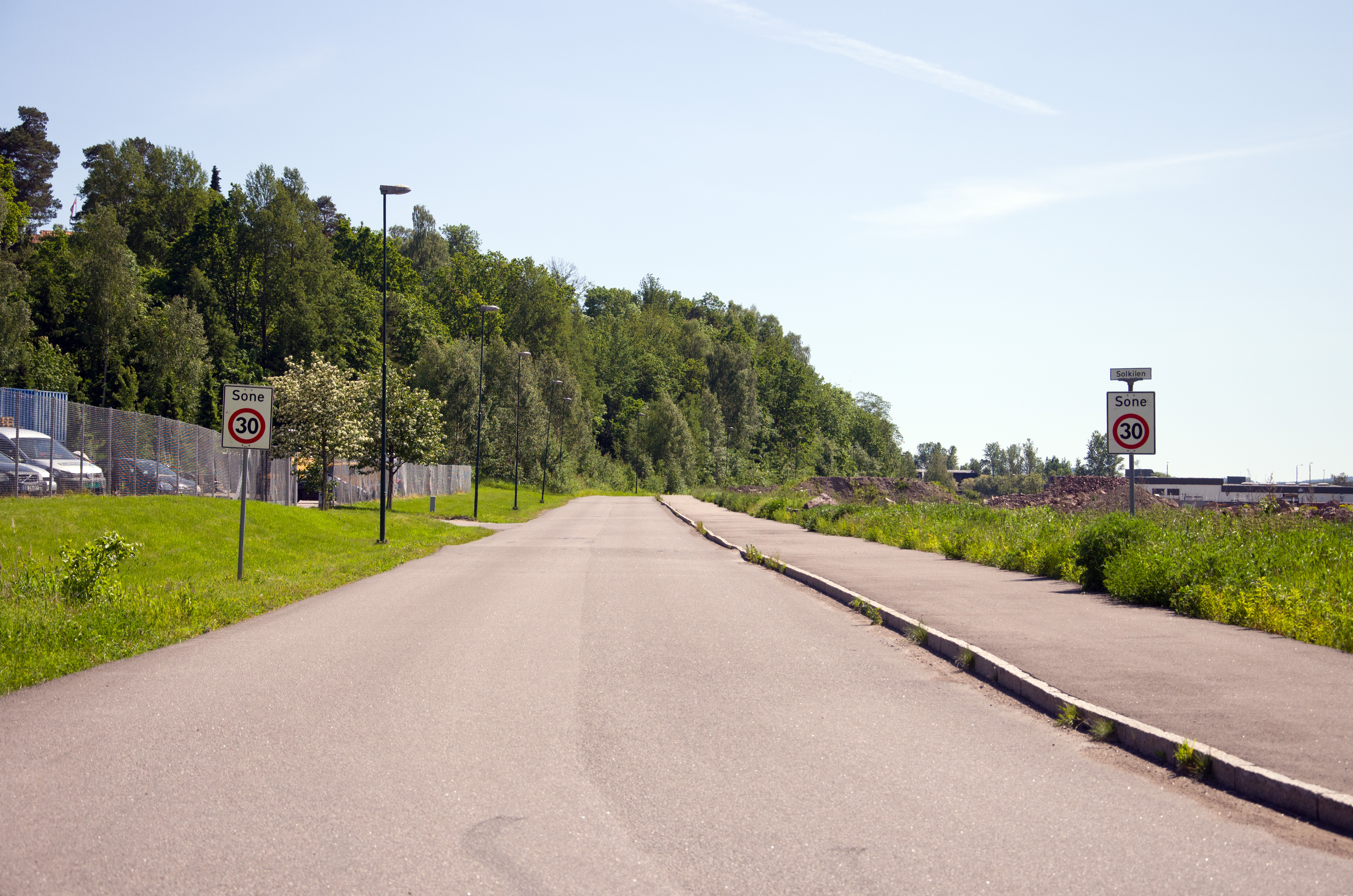 Solkilen, Tønsberg